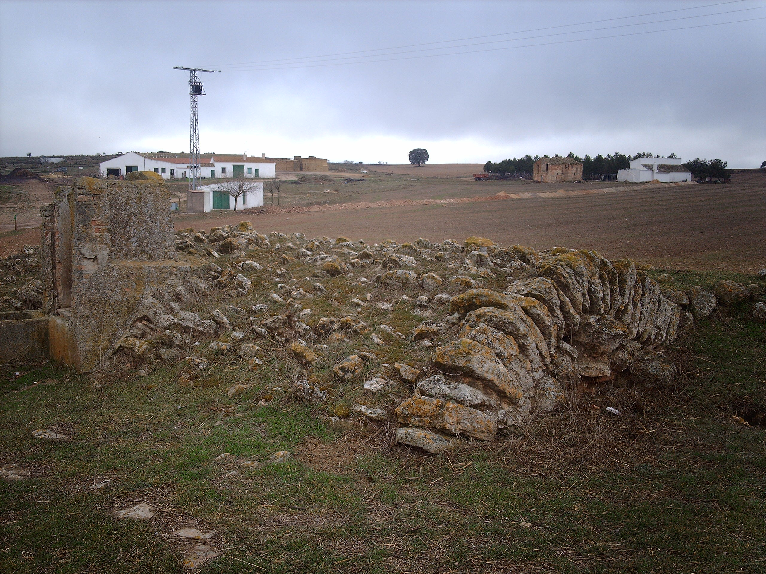 Aljibe de tipología muy característica de época hispano-musulmana o anterior. Ubicado en la Aldea de Moharras.